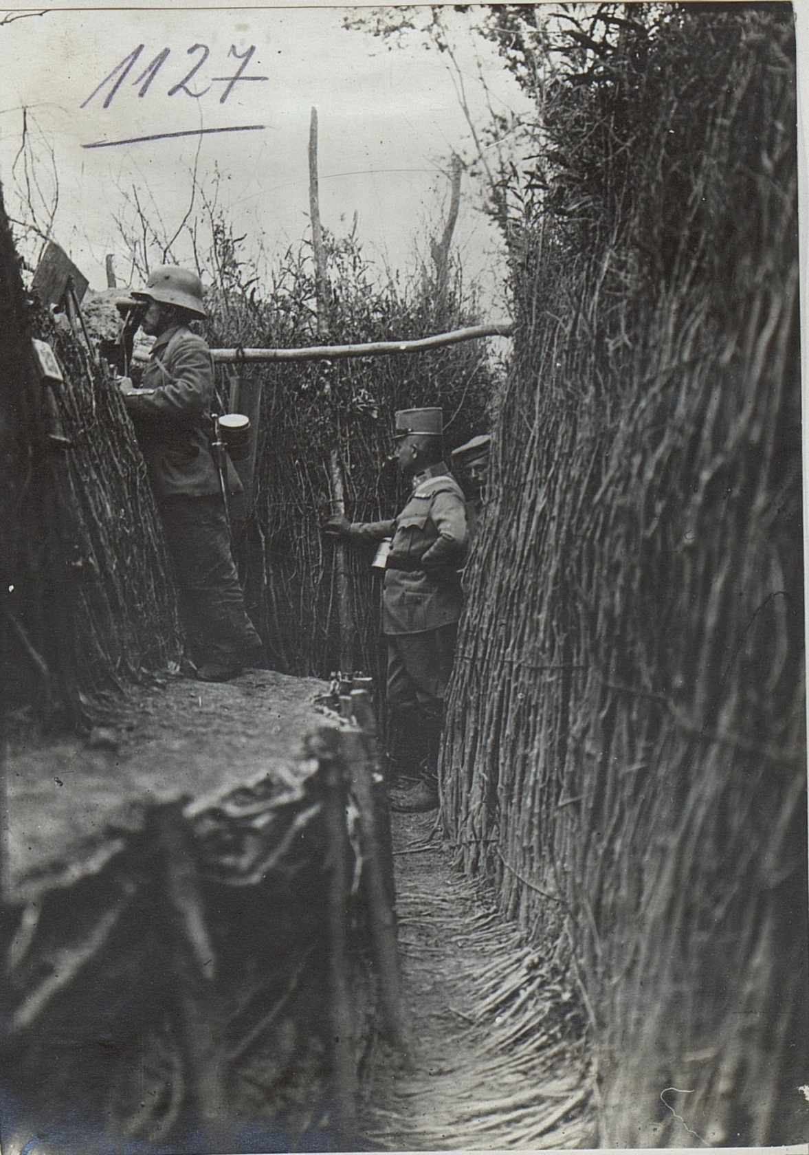 Grabenposten beim bayr.L.I.R.2 in Herbutow.